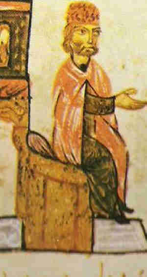 Miniatura del zar Simeón el Grande en el Madrid Skylitzes